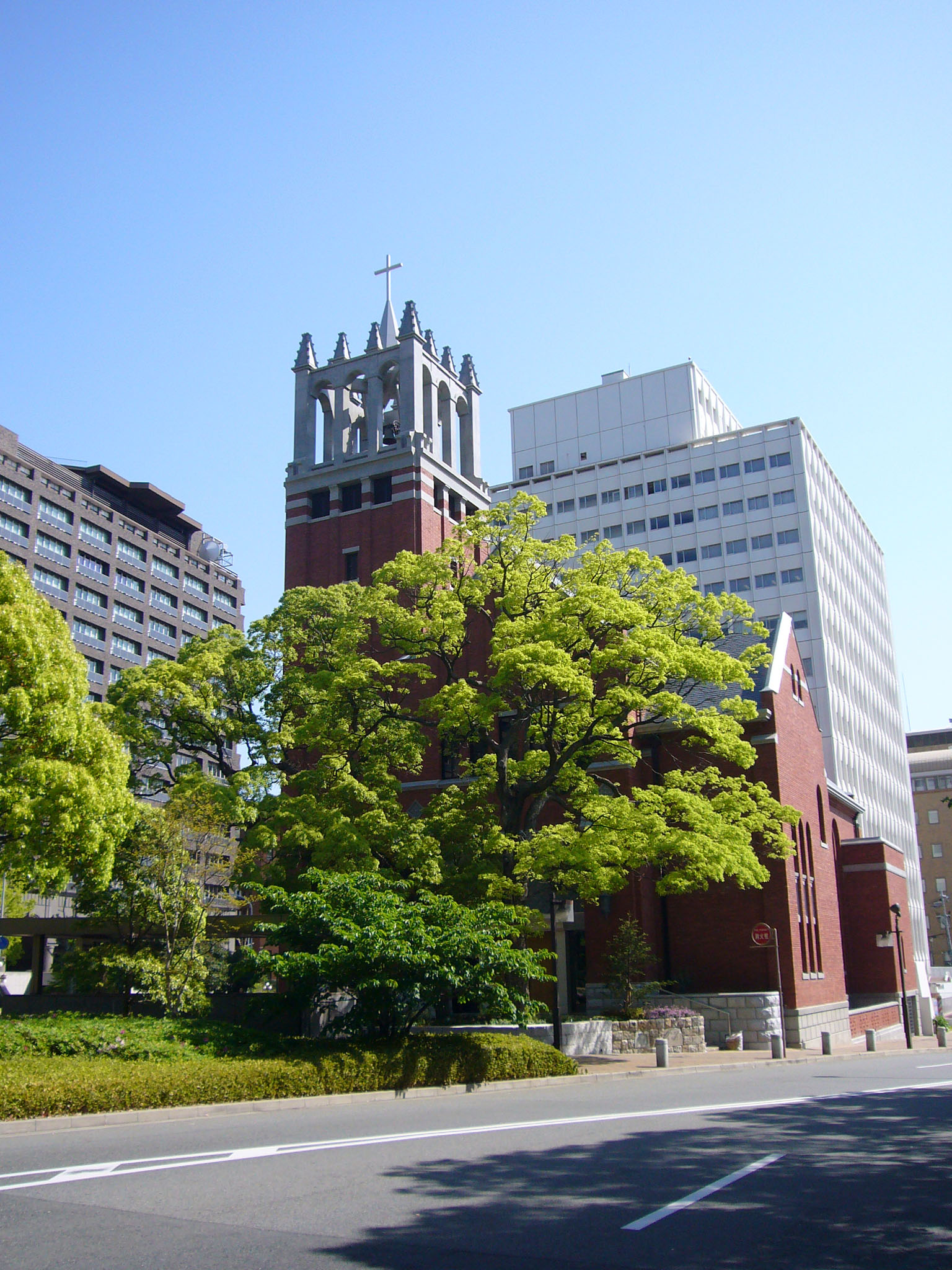 Kobe Eiko Church in Kobe, Japan